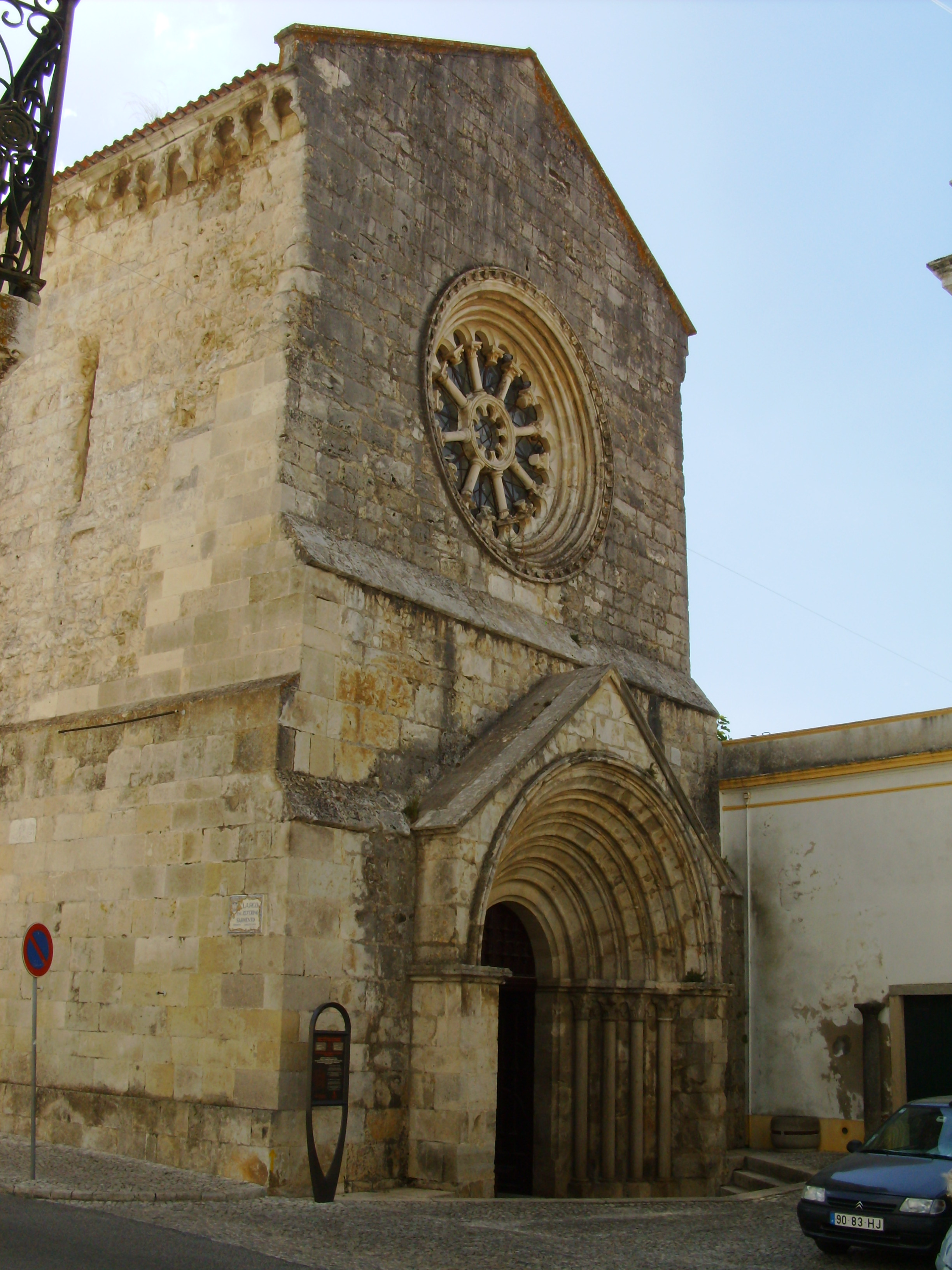 Igreja de São João de Alporão, Santarém, Portugal: fachada.